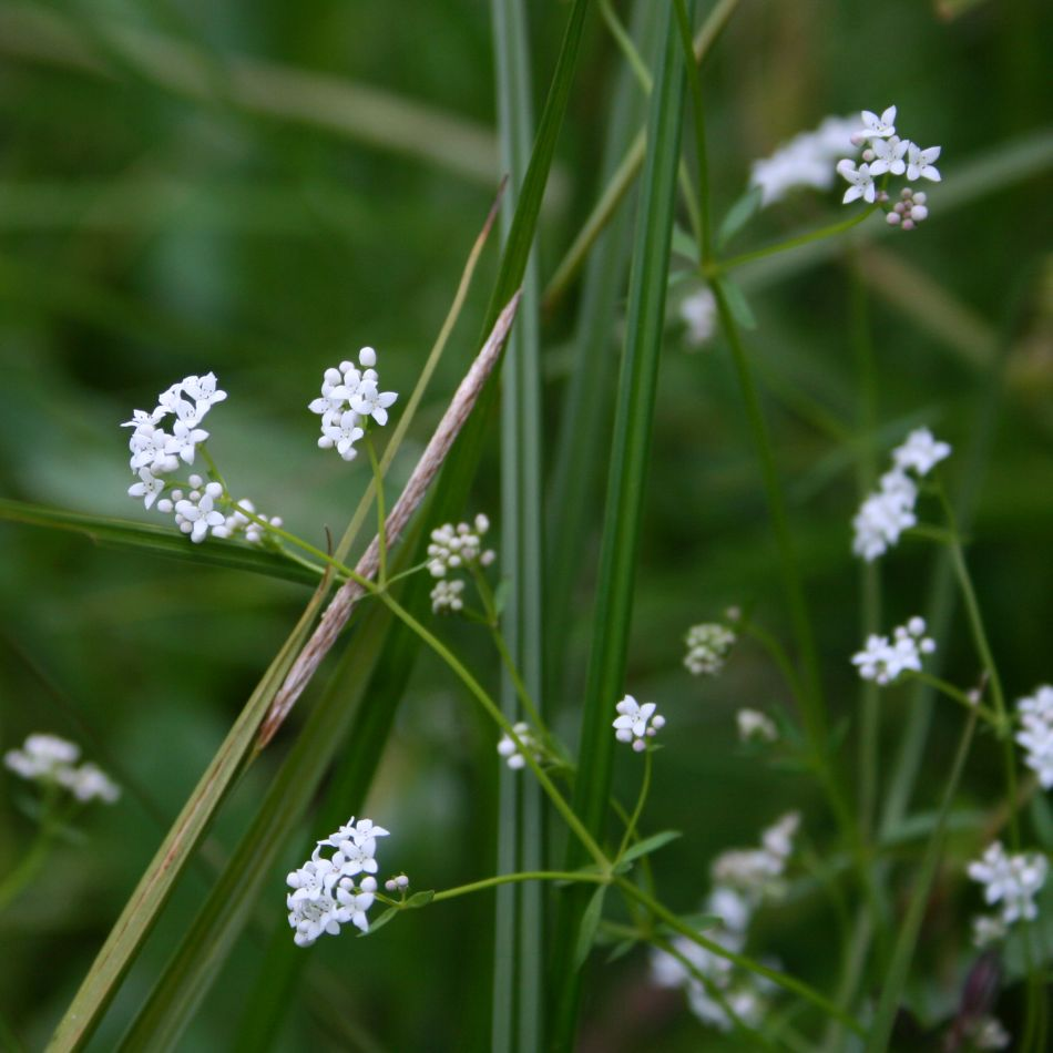 Sumpf-Labkraut (Galium palustre), Kaffeegewächse (Rubiaceae) - Österreich/Austria/Autriche: Oberösterreich, Hausruckviertel, Kien NW Attnang-Puchheim